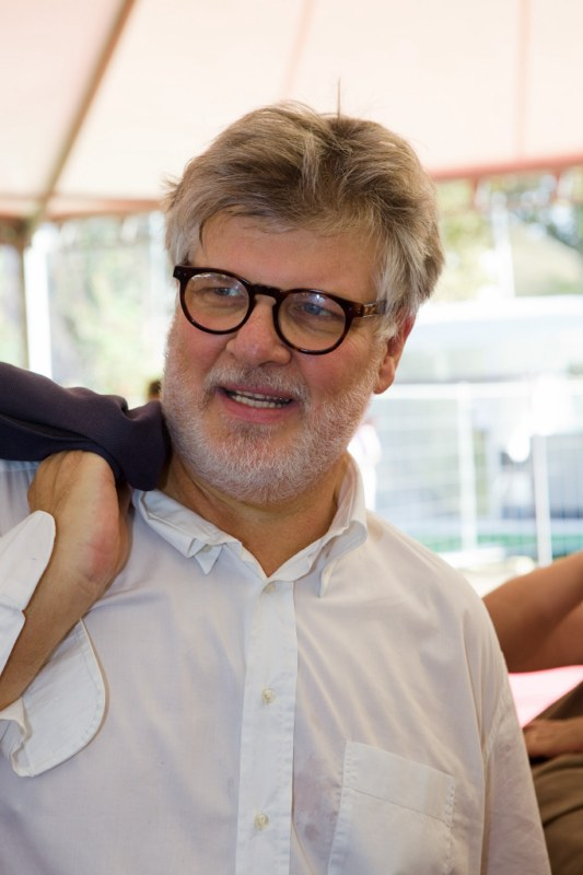 Primo piano di Carlo Mazzacurati